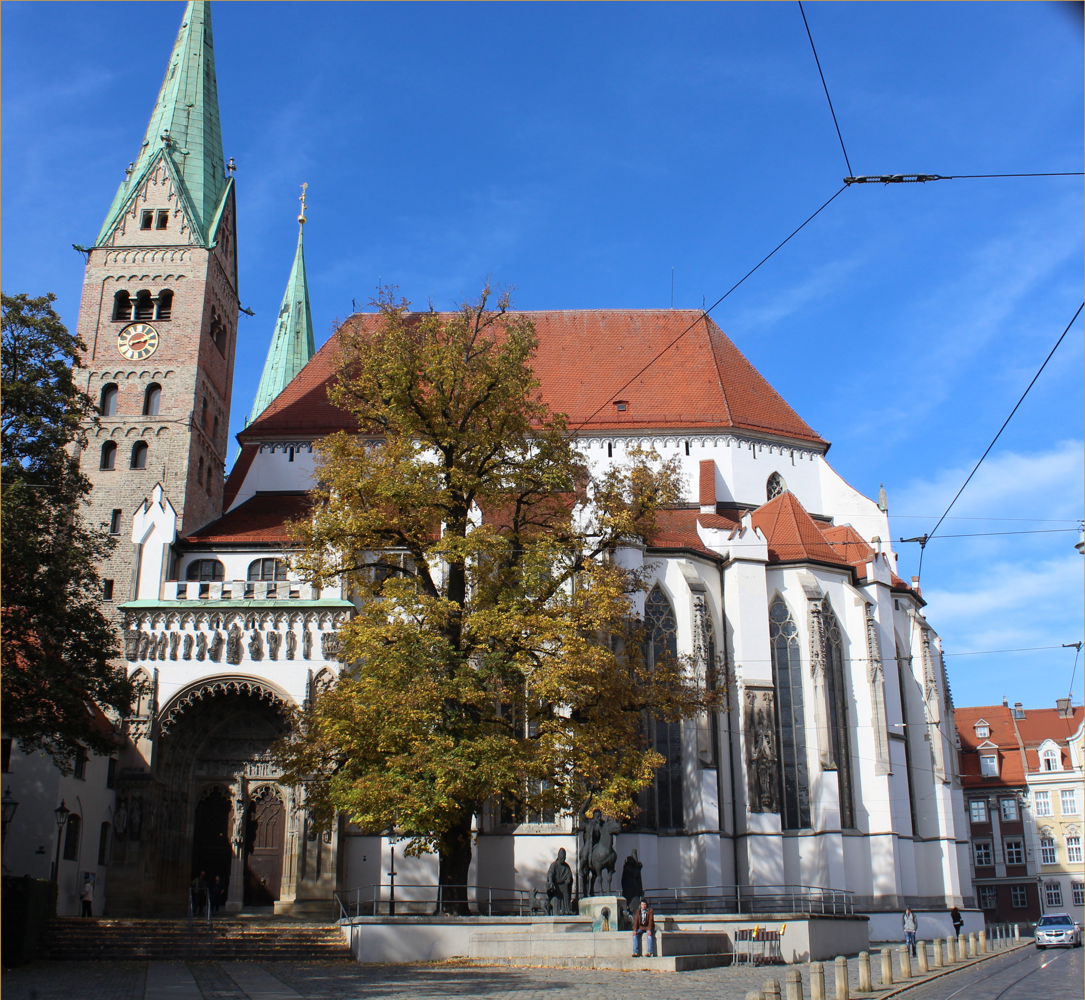 Dom, Augsburg